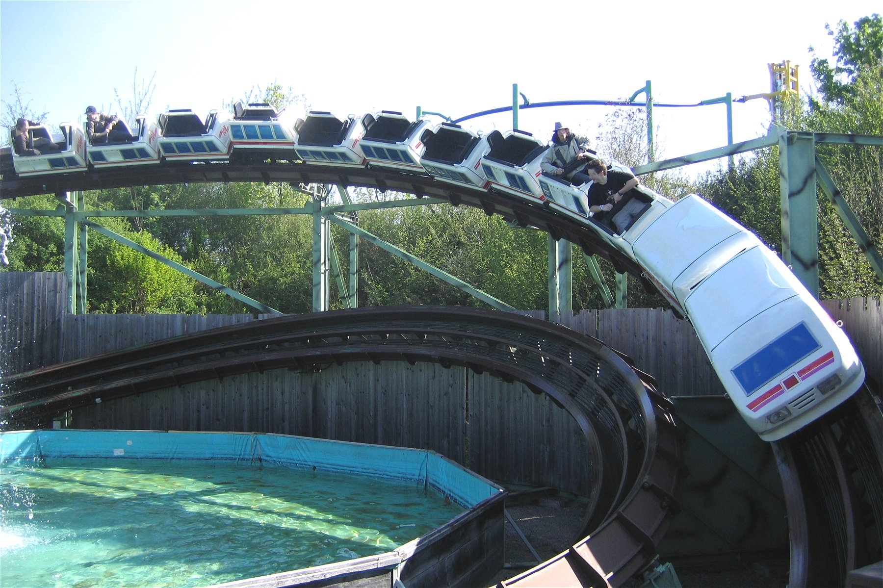 Allgäu-Skyline-Park, Skyline Express